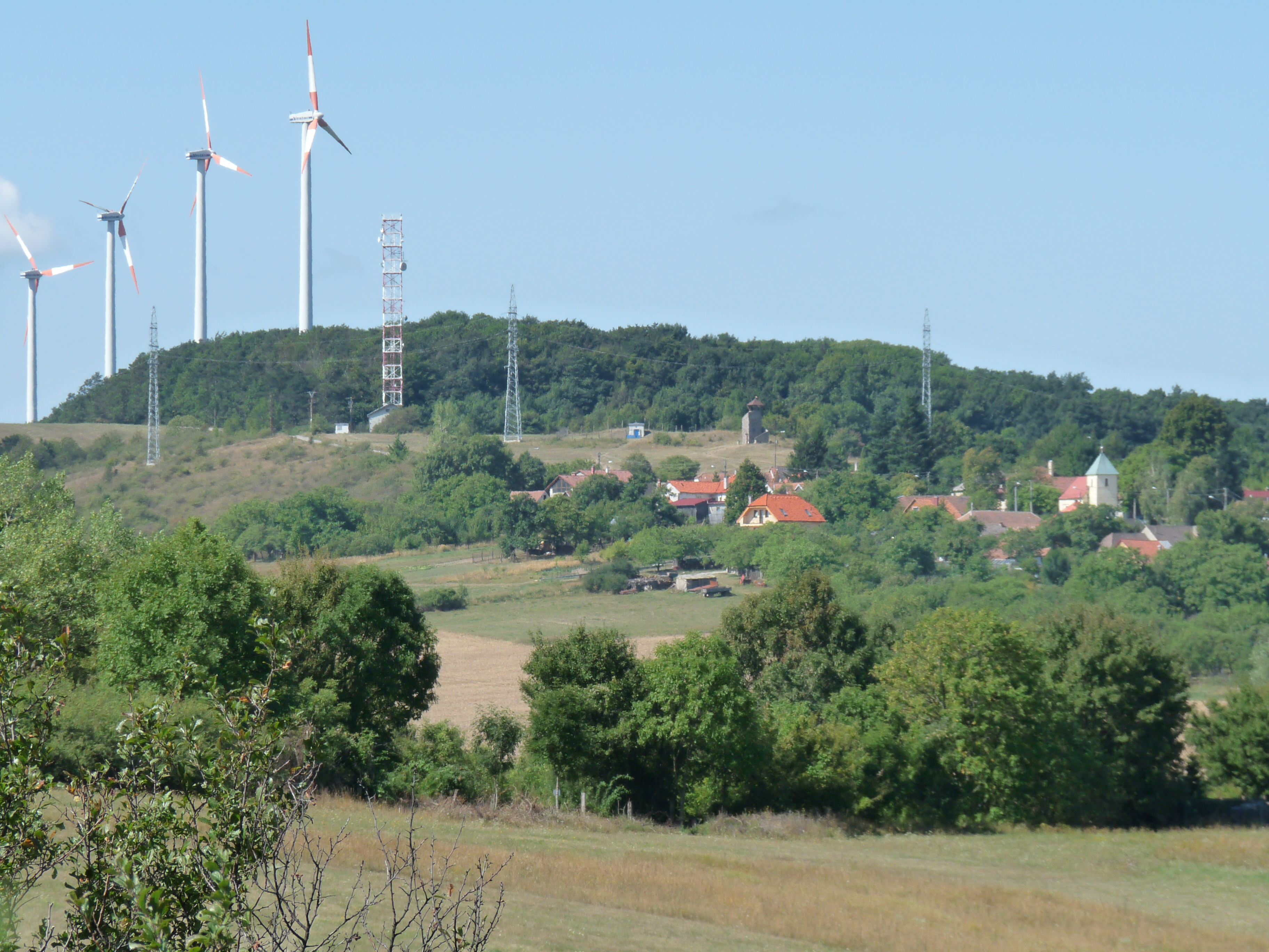 Rozbehy od Lipového vrchu